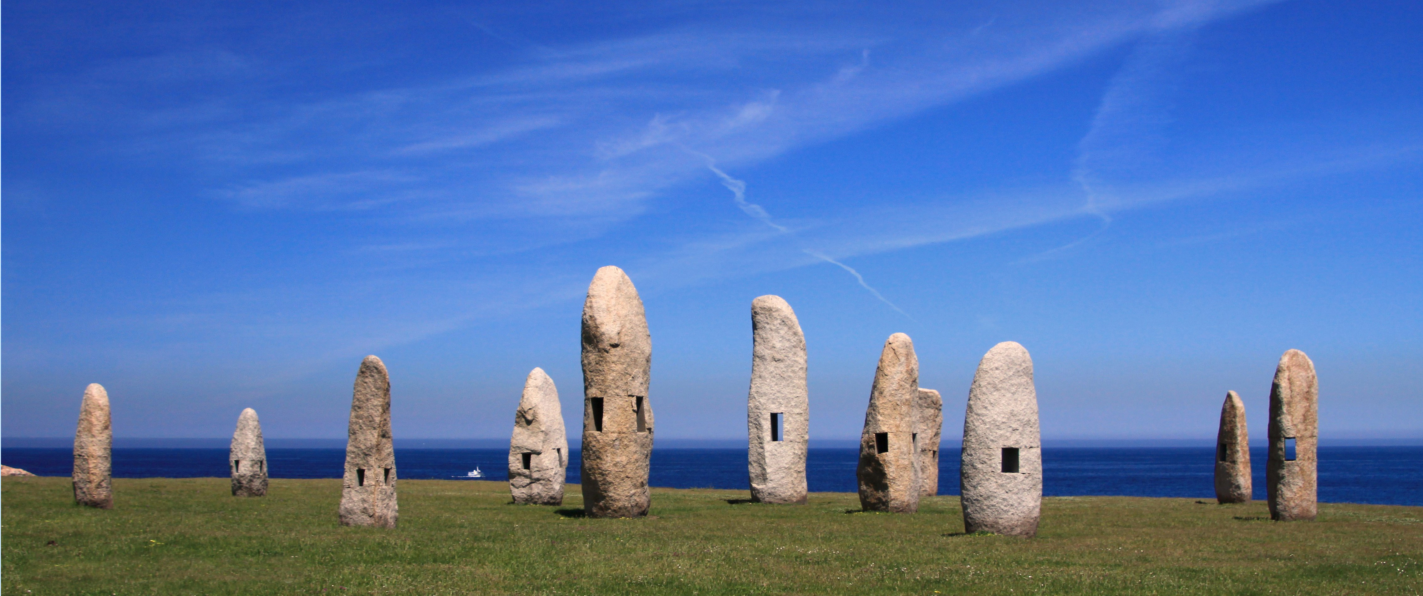 Menhires da Paz, parque dos menhires, Torre de Hércules, A Coruña